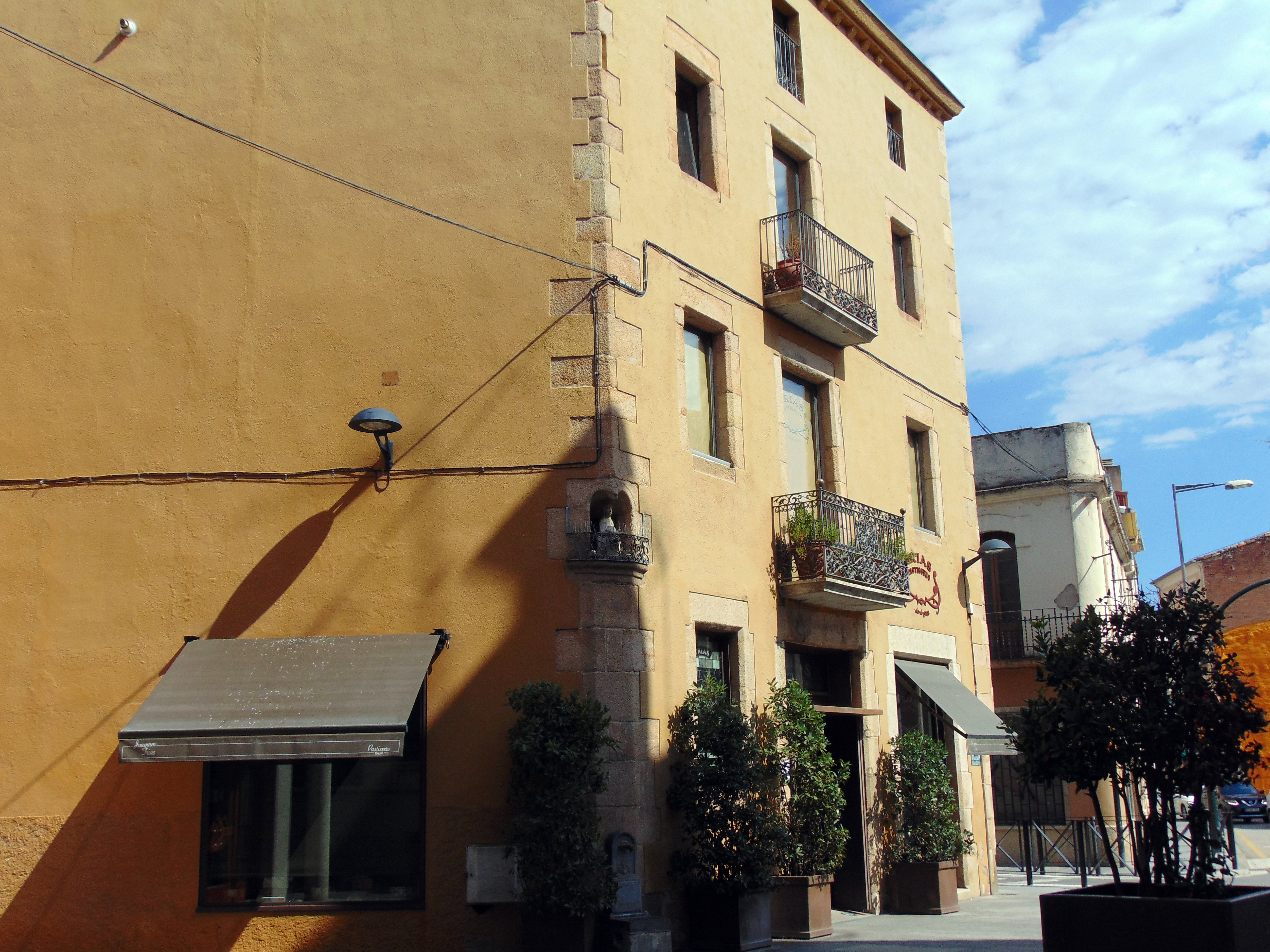 Edifici de la Pastisseria Trias des de l'any 1908